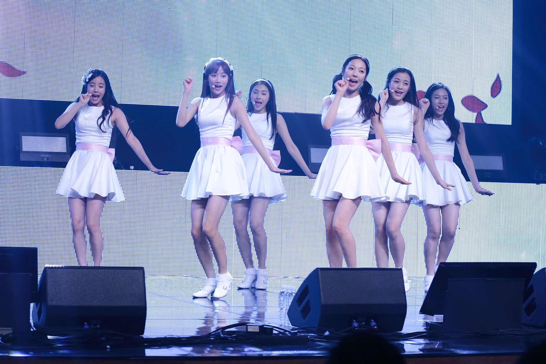 150825. 에이프릴 쇼케이스.